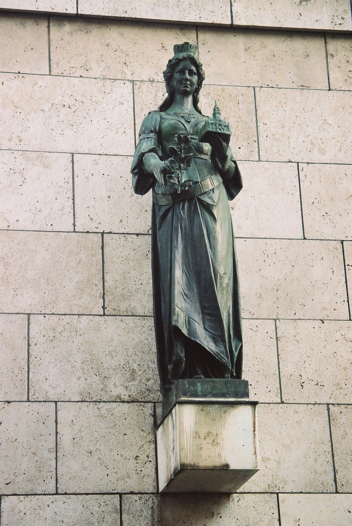 Stuttgardia personification of Stuttgart